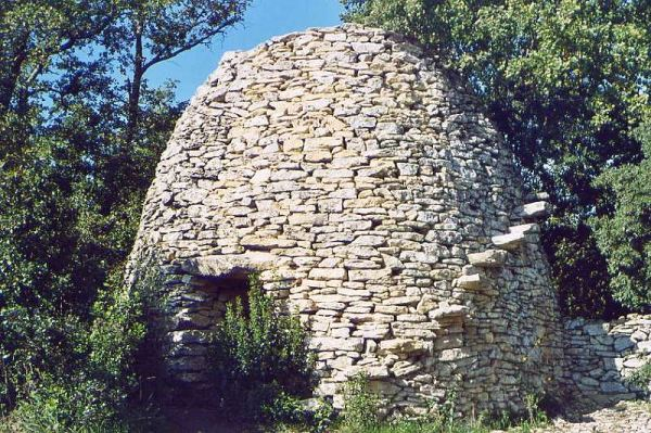 Description: Capitelle de la commune de Vers-Pont-du-Gard dans le département du Gard, France. Type peu fréquent, en forme d'obus, avec des marches volantes sur le dôme lui-même. Source: Hugo Soria Licence: GFDL Hugo Soria